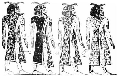 libyans drawn by ancient egyptiansزعماء قبائل أمازيغية كما رسمتهم ريشة فنان مصري حوالي سنة 1300 قبل الميلاد. عثر على الرسم في ضريح الفرعون ستي الأول( من الأسرة التاسعة عشرة)